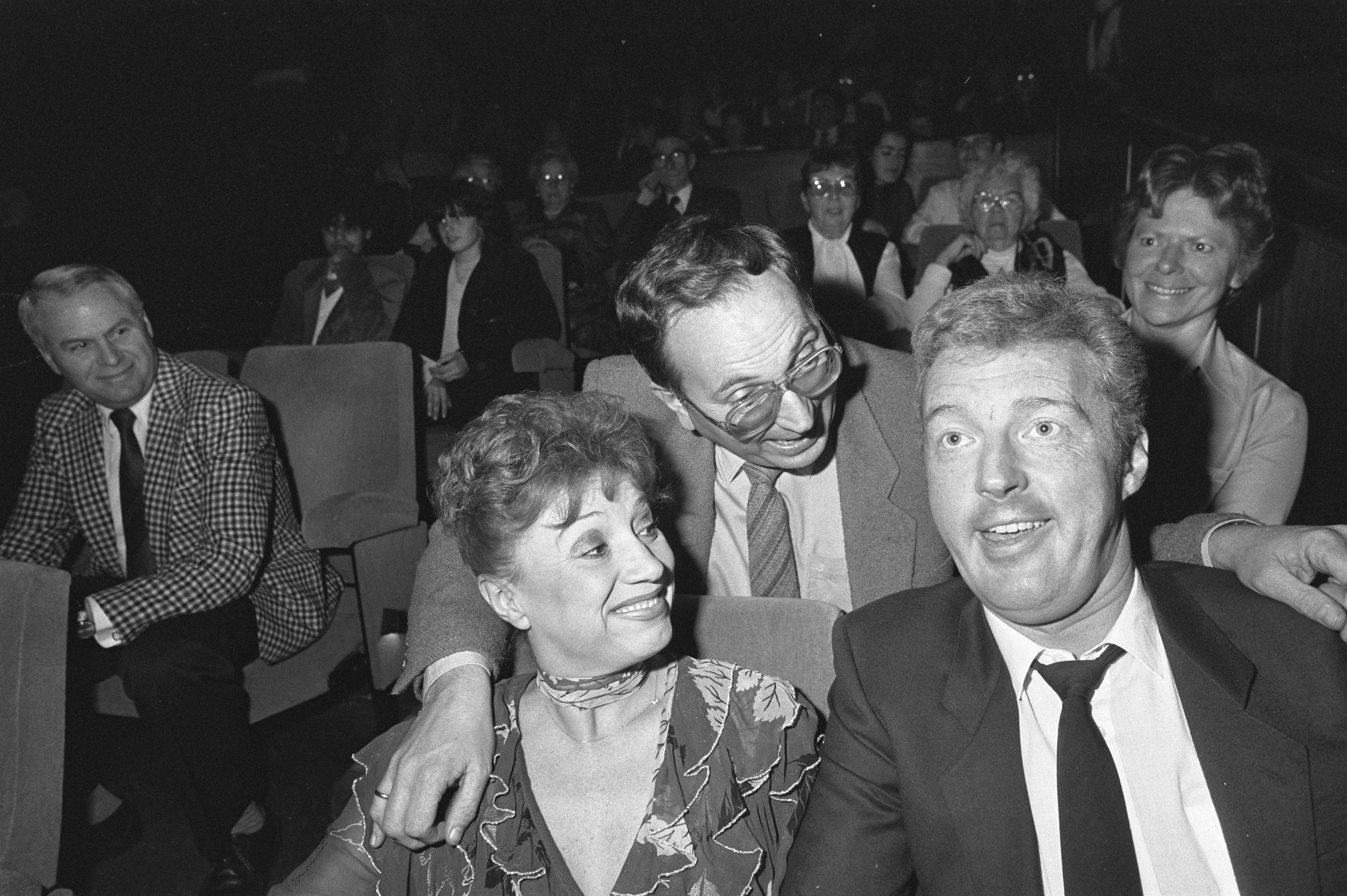 Collectie / Archief : Fotocollectie Anefo Reportage / Serie : [ onbekend ] Beschrijving : Film van André van Duin "Ik ben Joep Meloen" in première. Corrie van Gorp, Frans van Dusschoten en André van Duin Datum : 16 december 1981 Trefwoorden : acteurs, artiesten, bioscopen, films Persoonsnaam : Duin, André van, Dusschoten, Frans van, Gorp, Corrie van Fotograaf : Dijk, Hans van / Anefo Auteursrechthebbende : Nationaal Archief Materiaalsoort : Negatief (zwart/wit) Nummer archiefinventaris : bekijk toegang 2.24.01.05 Bestanddeelnummer : 931-8629